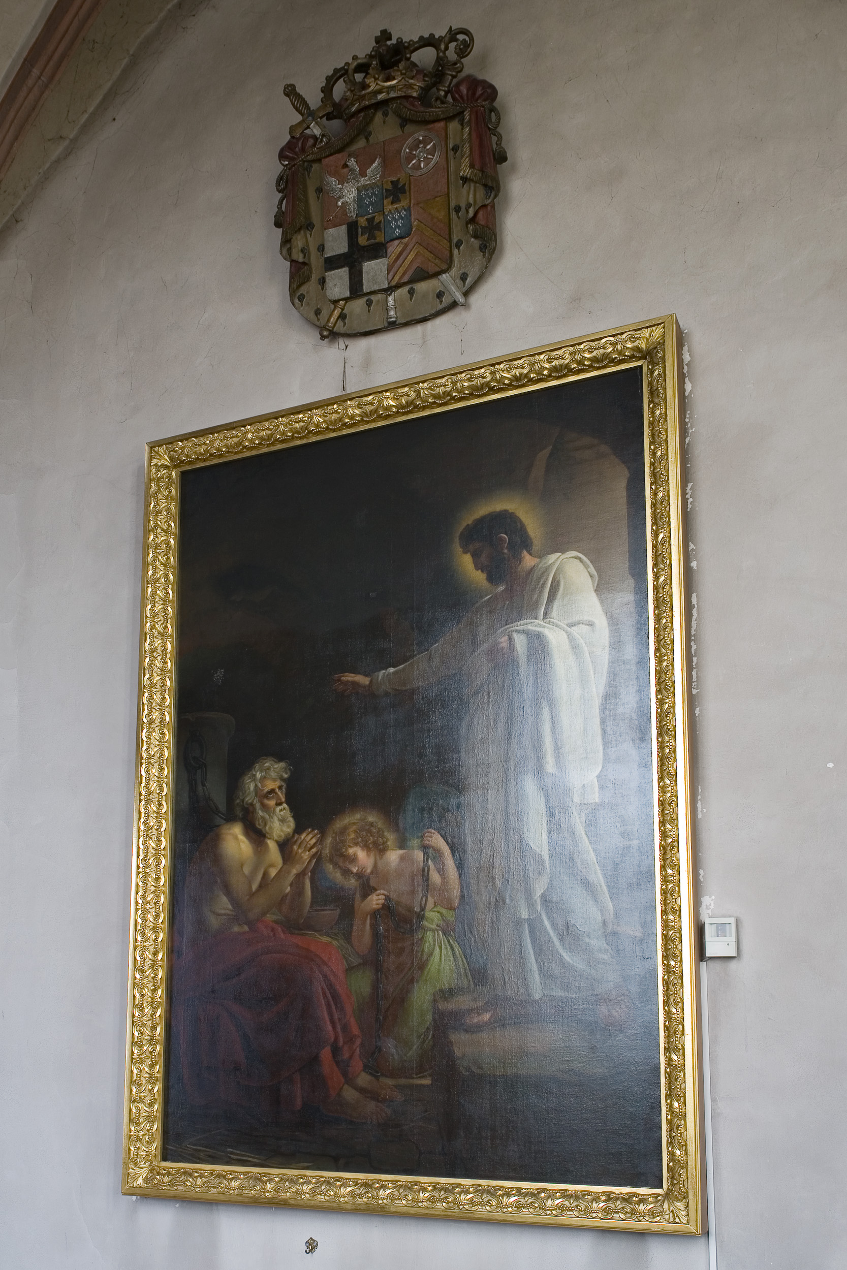 Mittelbild des 1984 abgebrochenen Leonhardsaltars, im Wesentlichen von Großherzog und Fürstprimas Karl von Dalberg gestiftet (1813), Gemälde von Joseph Stieler in der Leonhardskirche in Frankfurt am Main. Darüber das ebenfalls zum einstigen Altar gehörige Wappen des Großherzogtums Frankfurt. Selber fotografiert im März 2008, Doppellizensierung GFDL & CC-BY-SA 2.5.